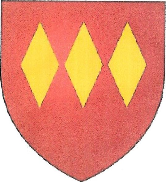 Blason des de voisins